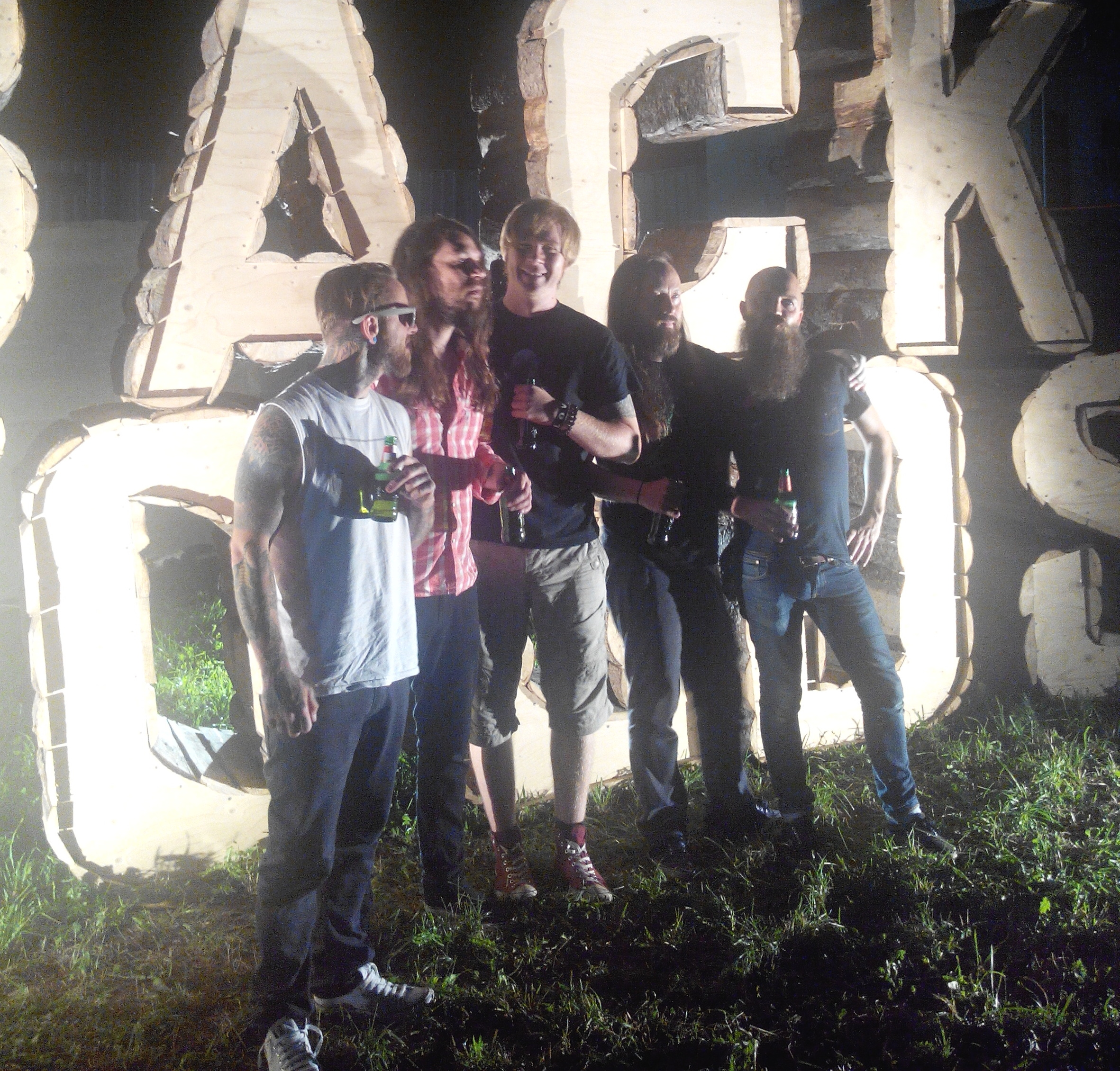 Le groupe Black Spiders au festival Backwoods à Thônes (Haute-Savoie, France).